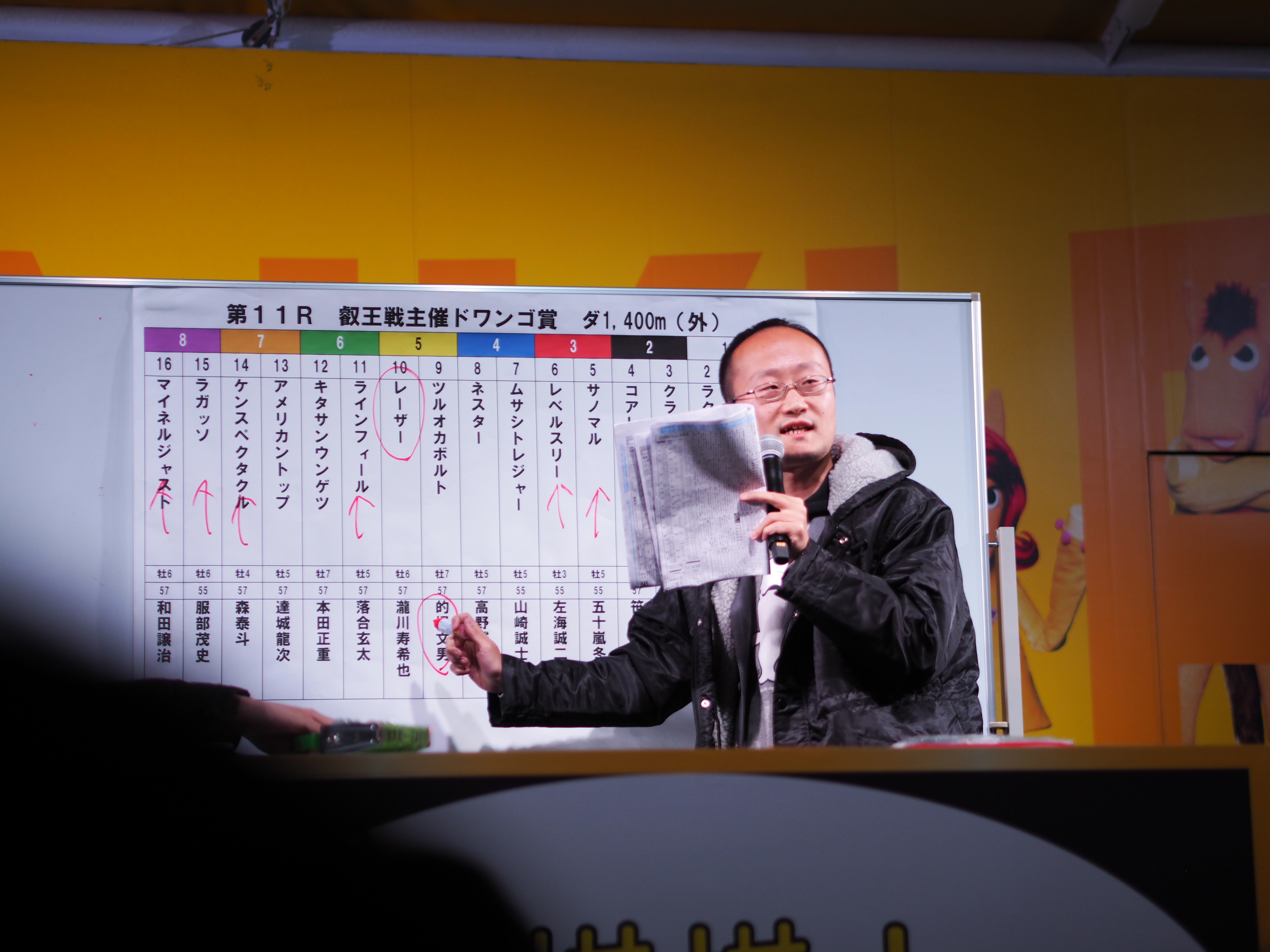 ニコニコ将棋・将棋棋士競馬研 予想屋by渡辺棋王・高見叡王・藤森五段